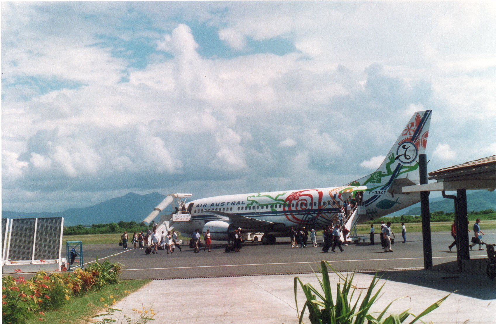 Avion Air Austral à Pamandzi (Mayotte)